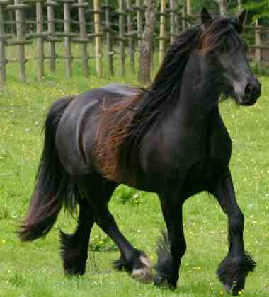 Fellpony. Fotografiert von K.Lunzer, mit Zustimmung der Autorin (lunzer.de) unter GFDL veröffentlicht